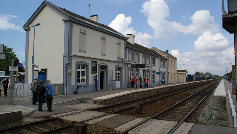 La gare de Noyelle sur Mer